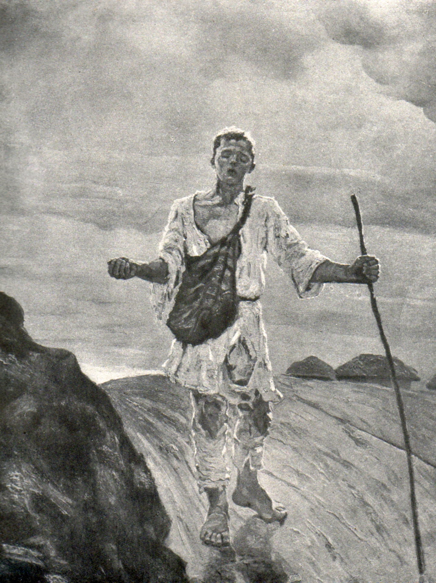 Orbul